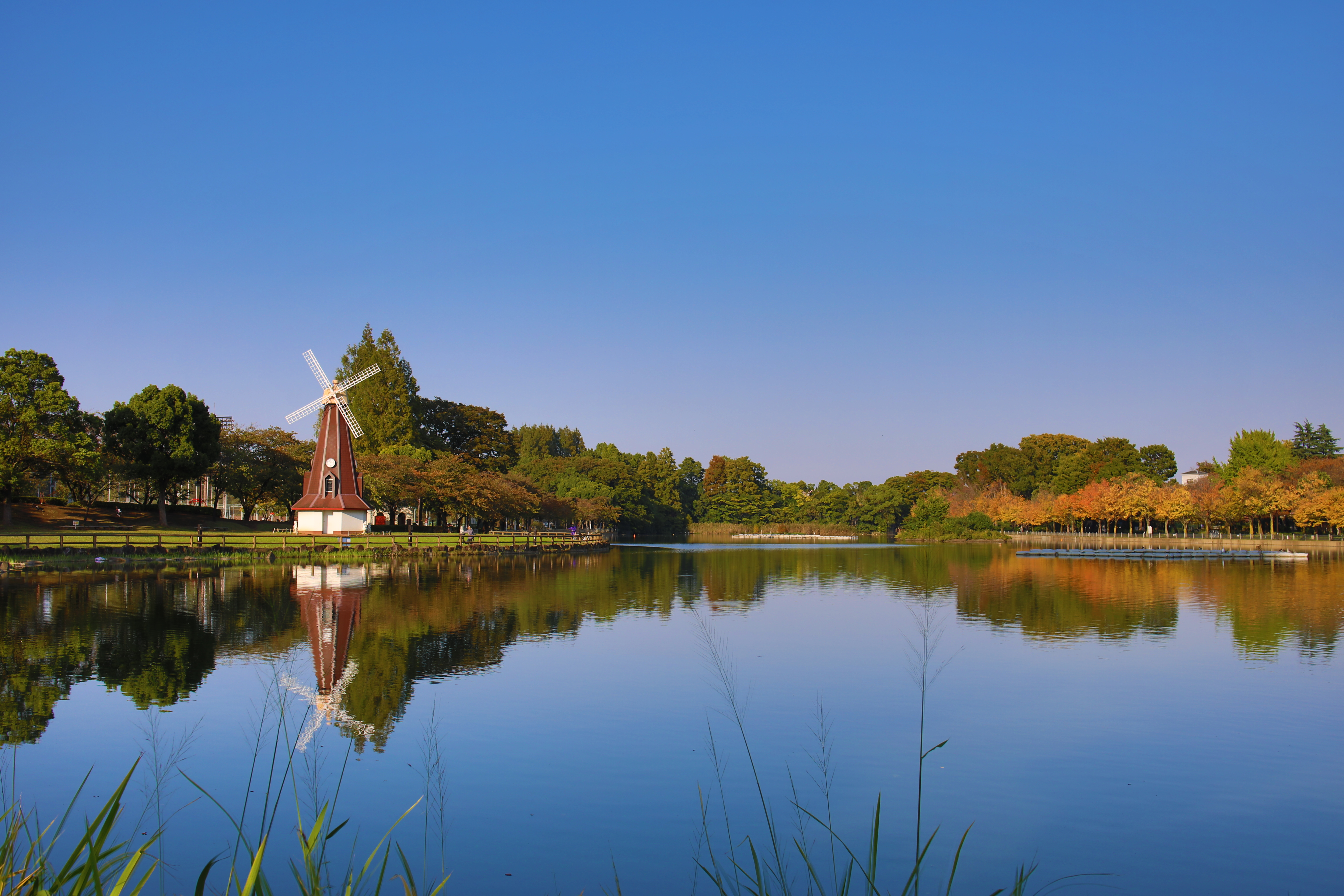 秋の浮間ヶ池